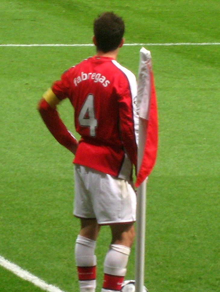 Arsenal's captain Cesc Fàbregas